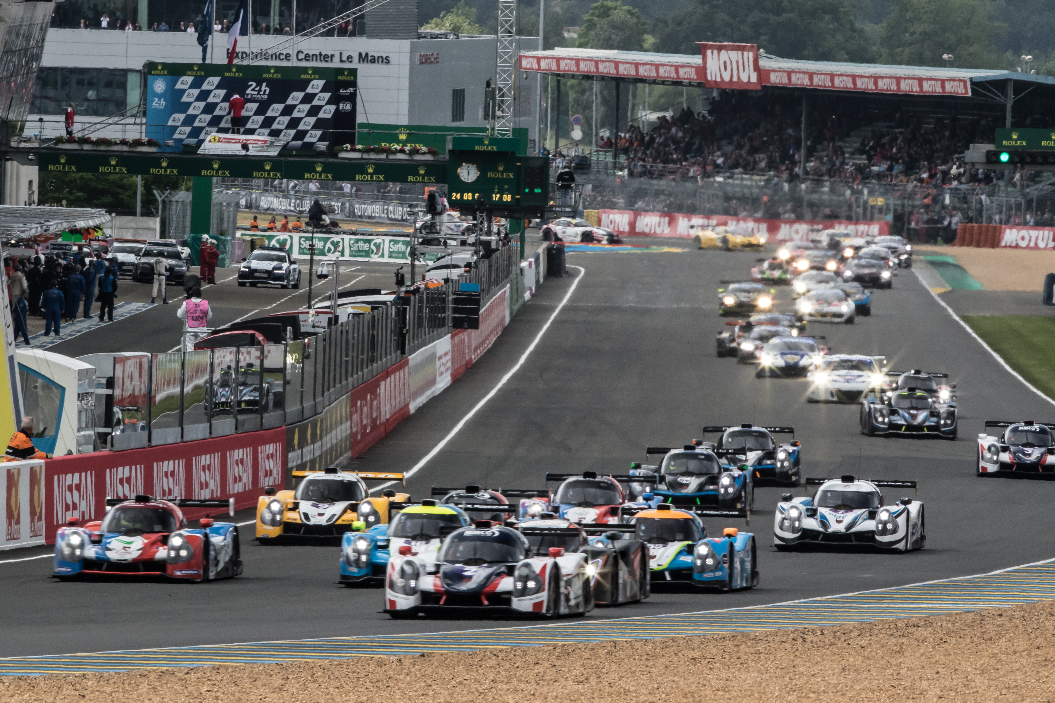 Start Le Mans 24 Hour - Circuit des 24H du Mans - Le Mans - France